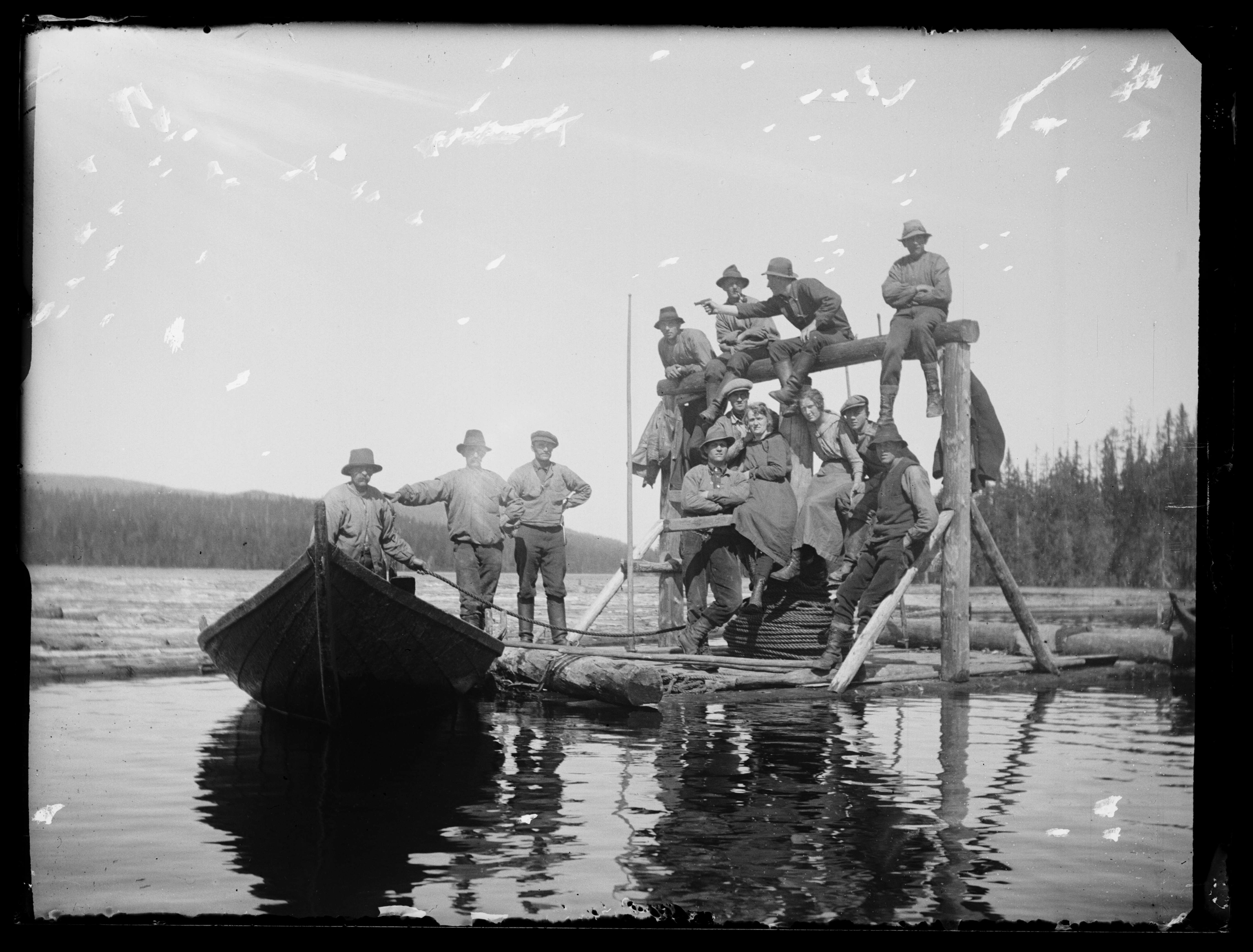 Timmerflottare i Almsjön, Dalarna. ”På grund av hård motvind hade de varit tvungna att ligga vid Ljusnäs fäbod en hel vecka. Anna besökte tillsammans med Valborg Dammare flottarlag.” Litteraturreferenser: LIMA bortom mannaminne, s 149